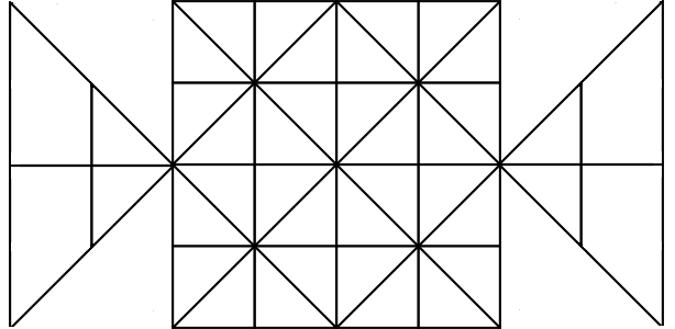 虎棋棋盤的一種。